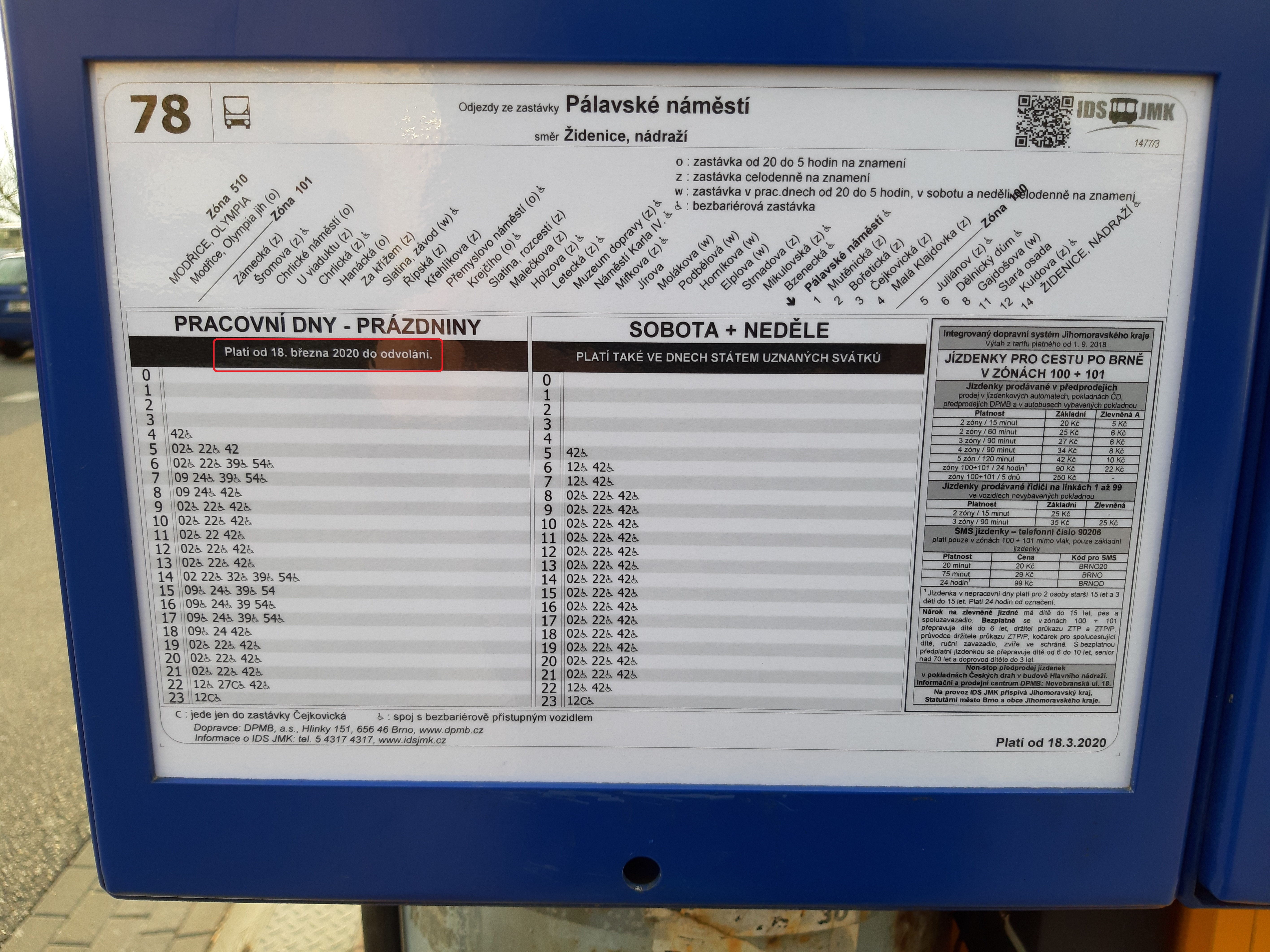 K-vir: Vzhledem k uzavření škol přešla MHD - od 18.3. - na prázdninový režim..